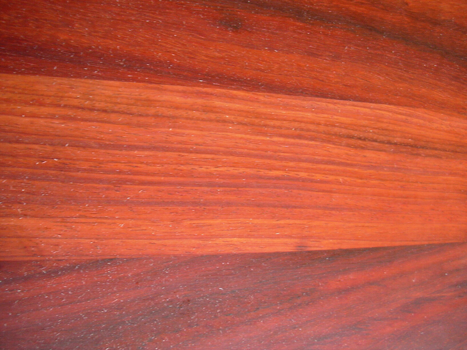 Struktura dřeva Padouk